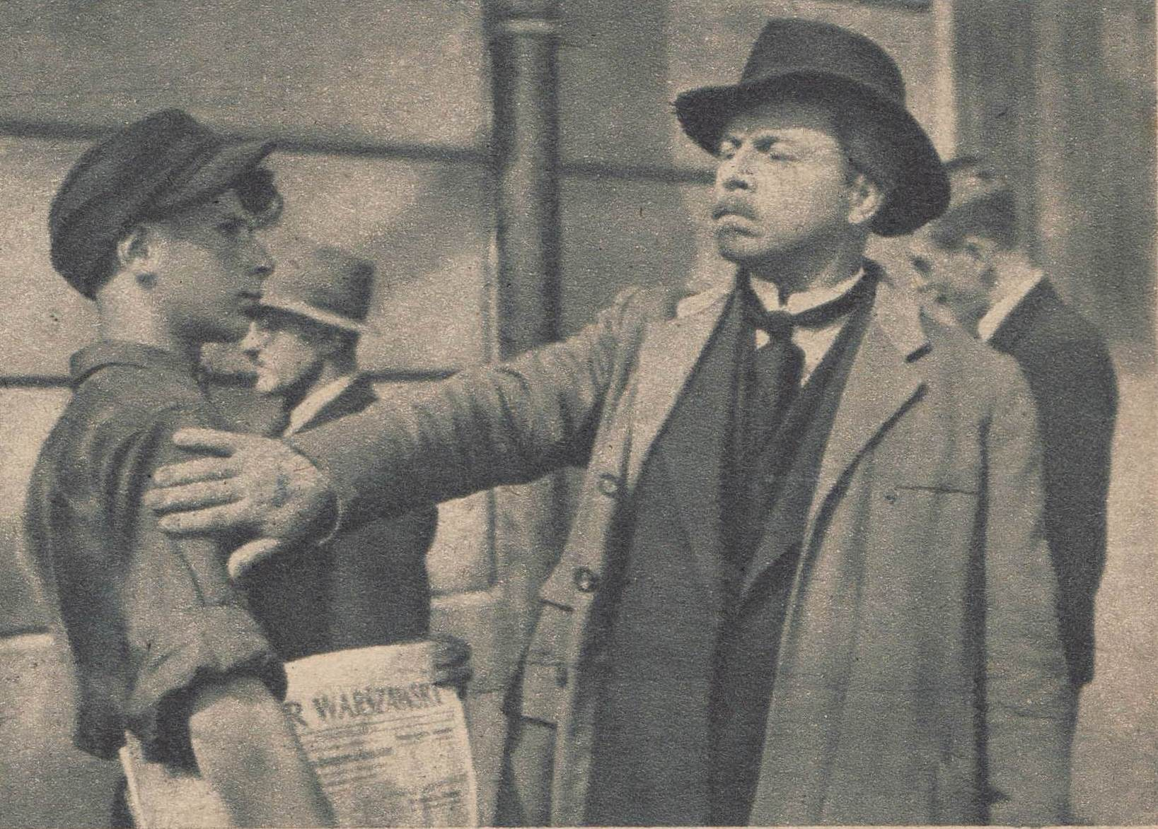 Jan Kurnakowicz. Kadr z filmu fabularnego Zakazane Piosenki nakręconego w 1946 roku.